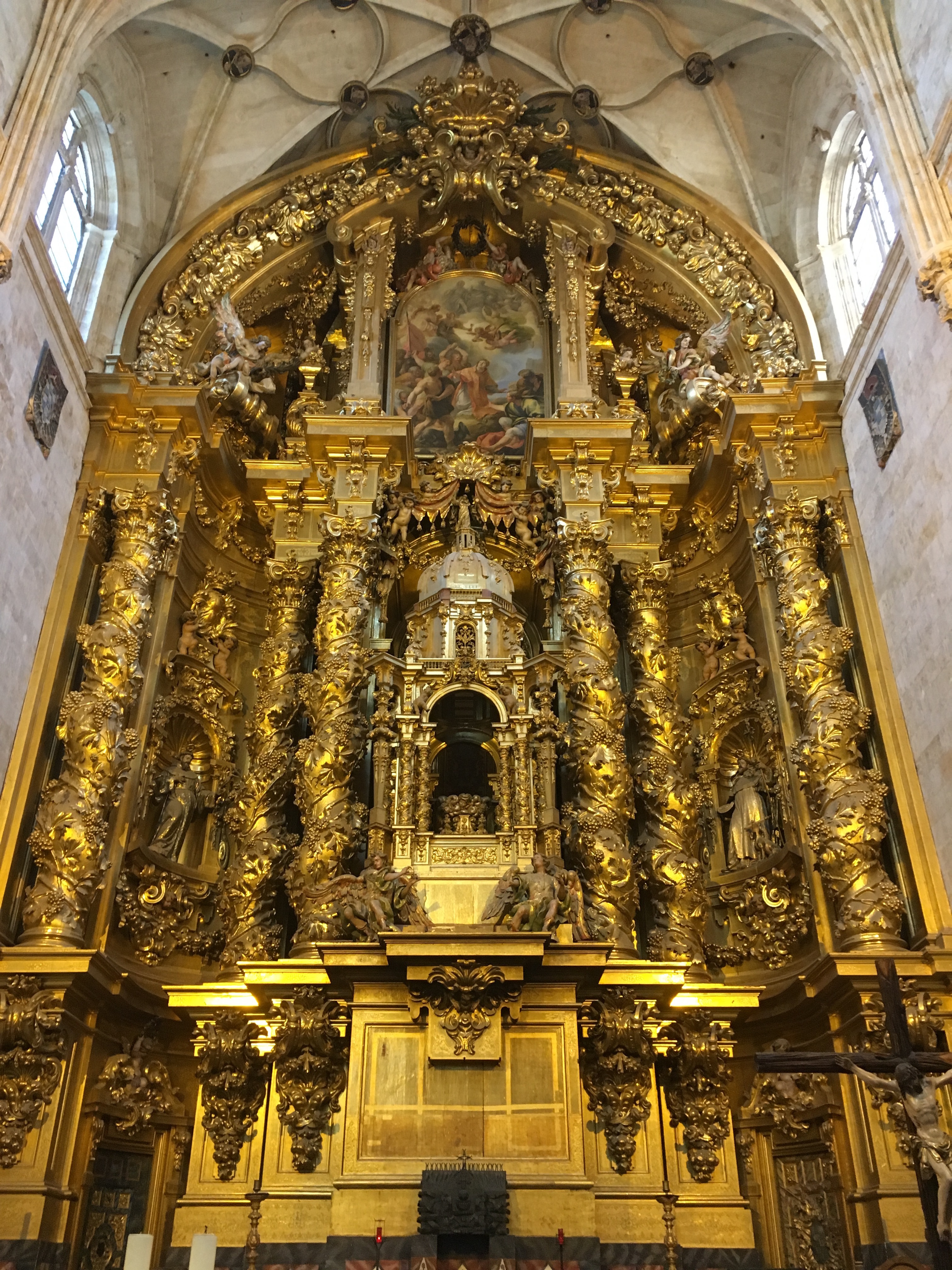 Retablo del altar mayor de la iglesia del convento de San Esteban en Salamanca.